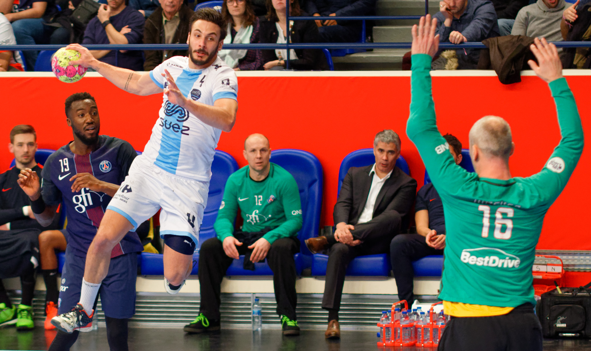 Rencontre de championnat de LidlStarLigue entre le PSG et l'US Créteil. A Coubertin, le 14 décembre 2016.